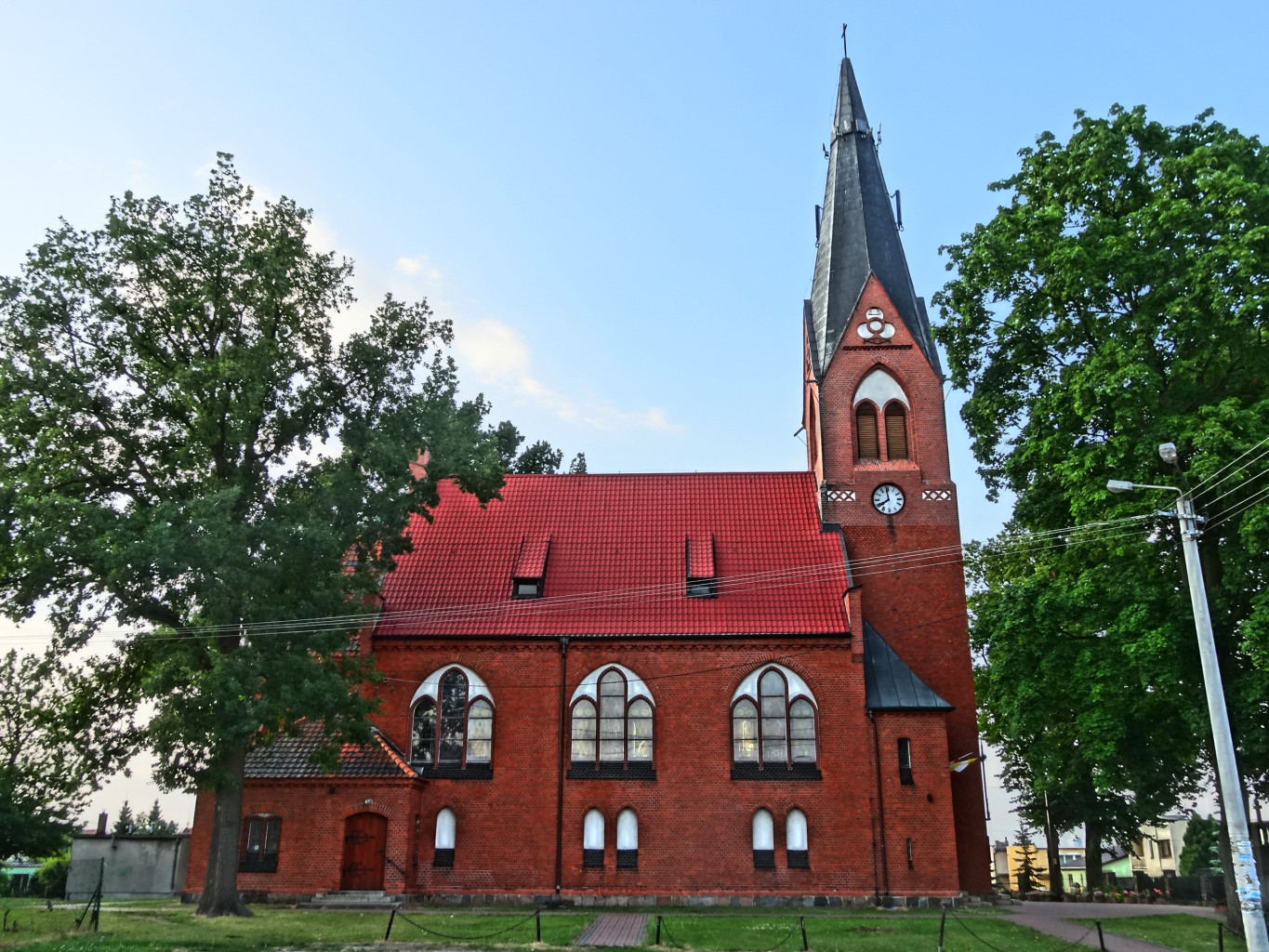 Kościół parafialny rzymskokatolicki pod wezwaniem św. Kazimierza w Łochowie, gmina Białe Błota, powiat bydgoski, diecezja bydgoska